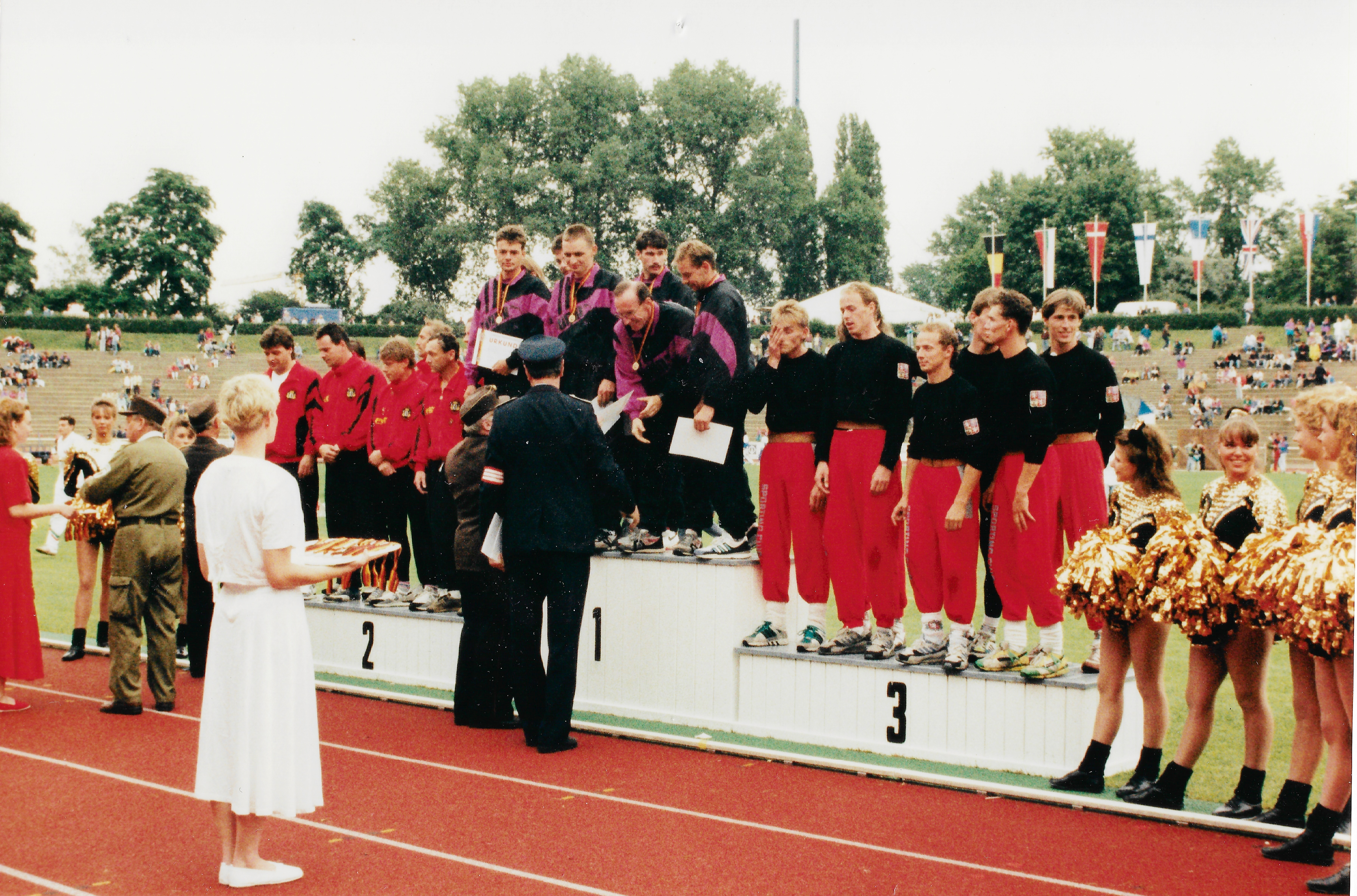 Berlin 1993: X. Internationale Feuerwehr-Sportwettkämpfe, Siegerehrung Disziplin Löschangriff Freiwillige Feuerwehren